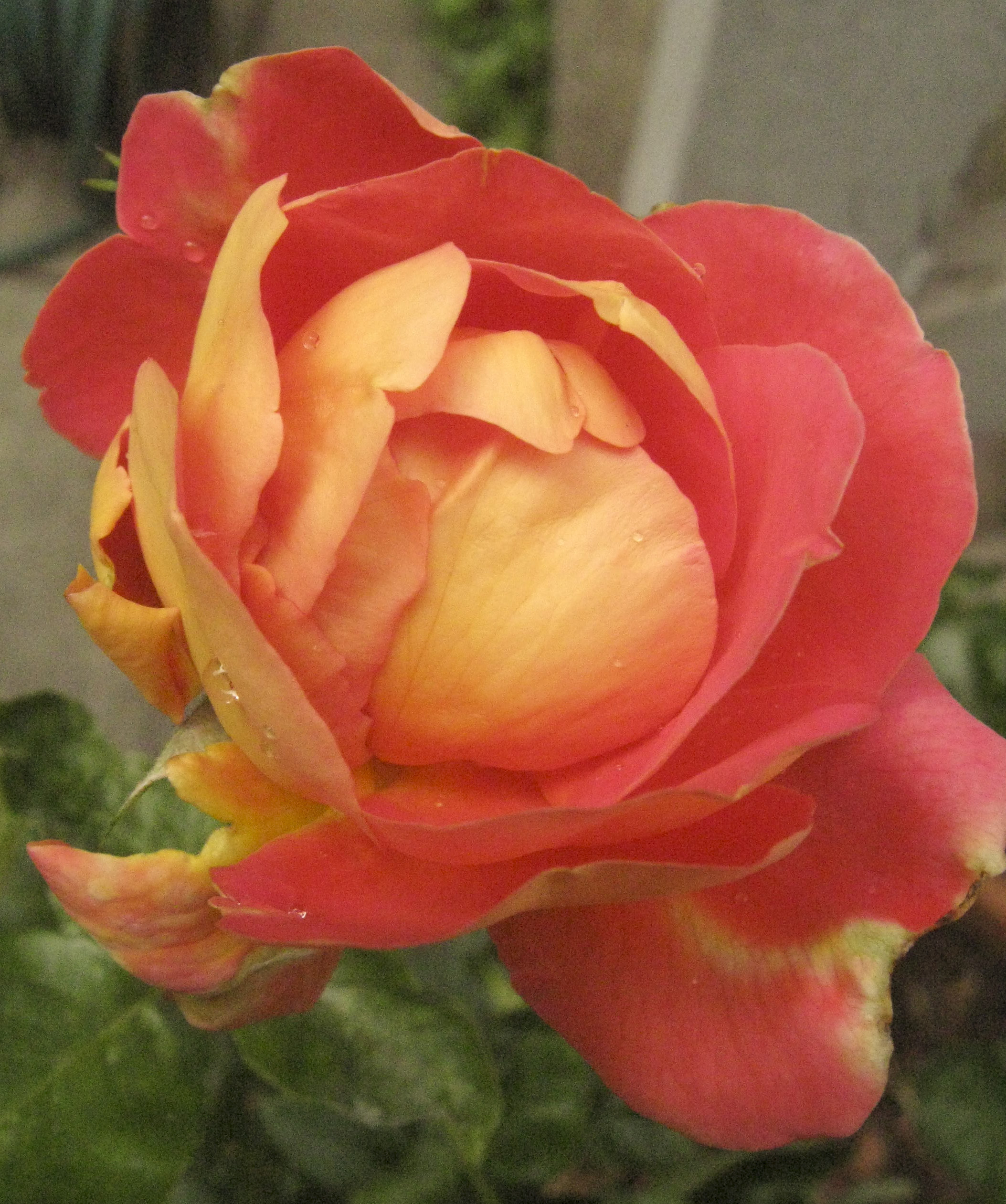 Rosa 'Condesa de Sastago' by Pedro Dot 1932